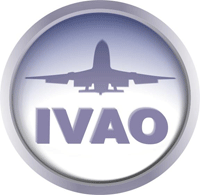 Logotipo de la International Aviation Organization IVAO